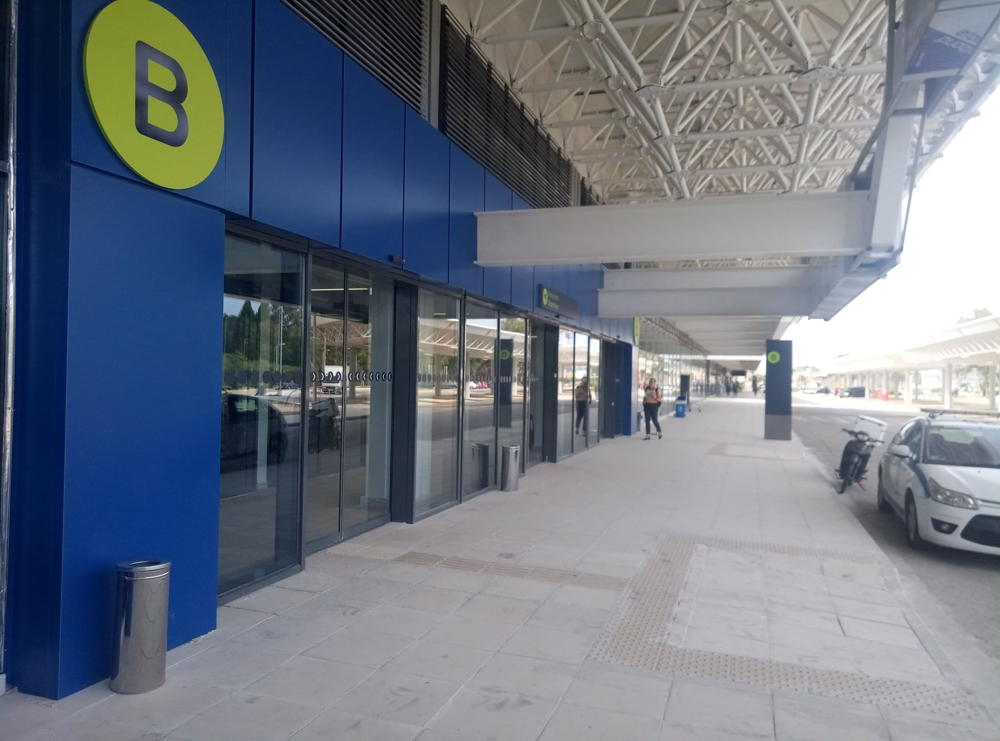 Εξωτερικός χώρος του αεροδρομίου της Κέρκυρας